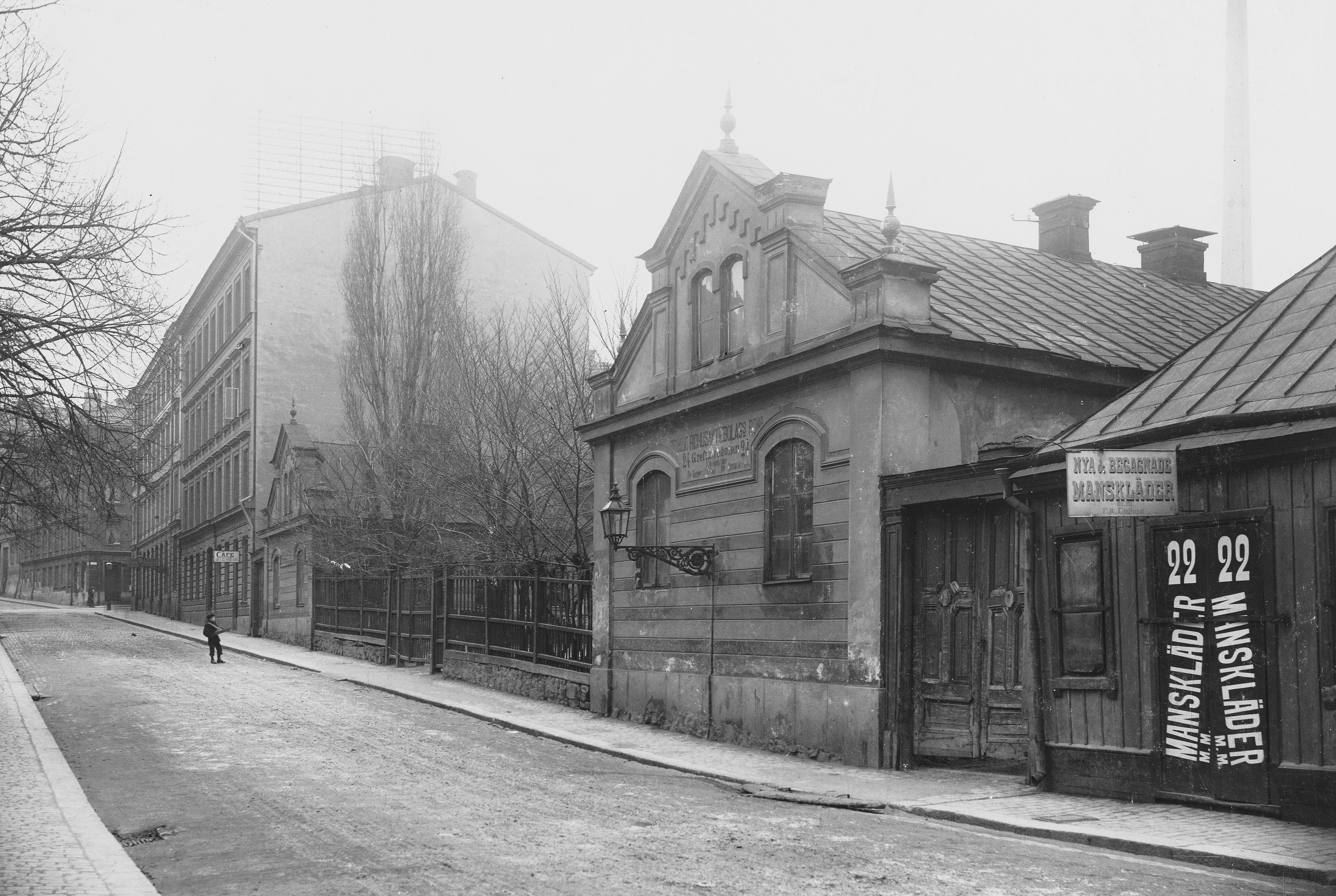 Stockholms Ridhusbolags ridhus, Grev Turegatan, kvarteret Riddaren 10+11. På platsen uppfördes 1898 Stockholms Tattersall